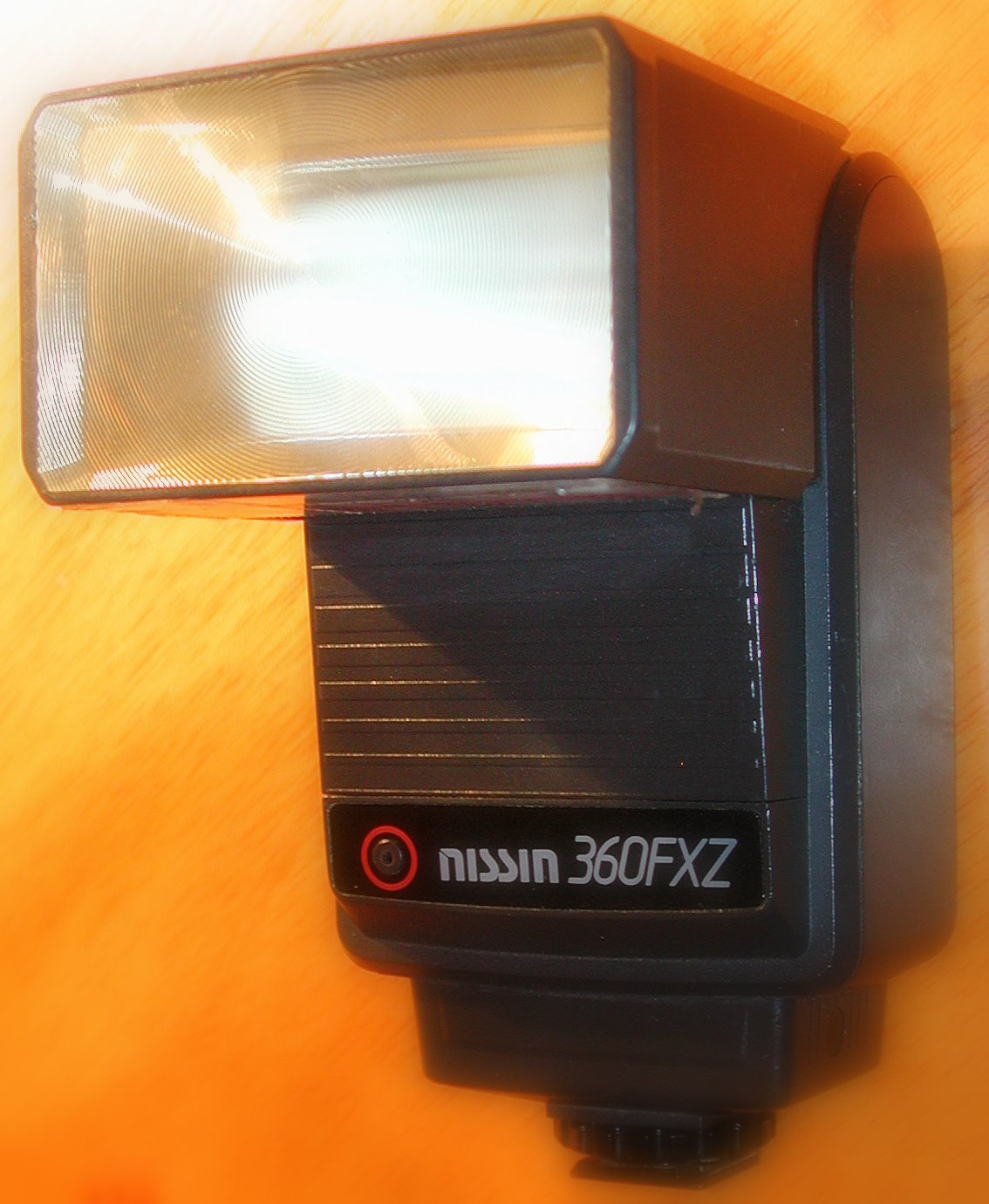 Flash NG36 NISSIN Auteur , photographie personnelle. 7 novembre 2006